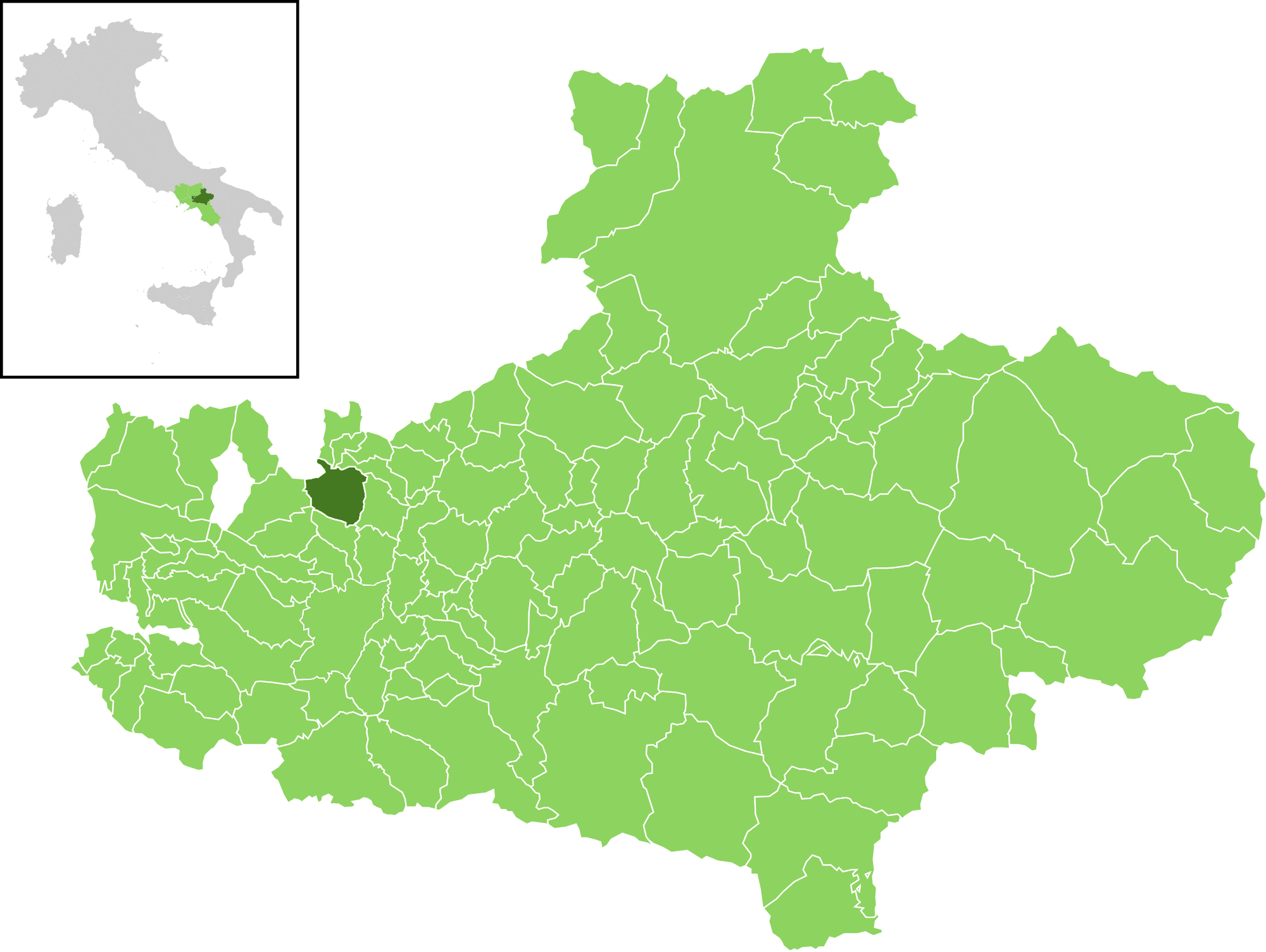 Il comune di Altavilla Irpino all'interno della provincia di Avellino